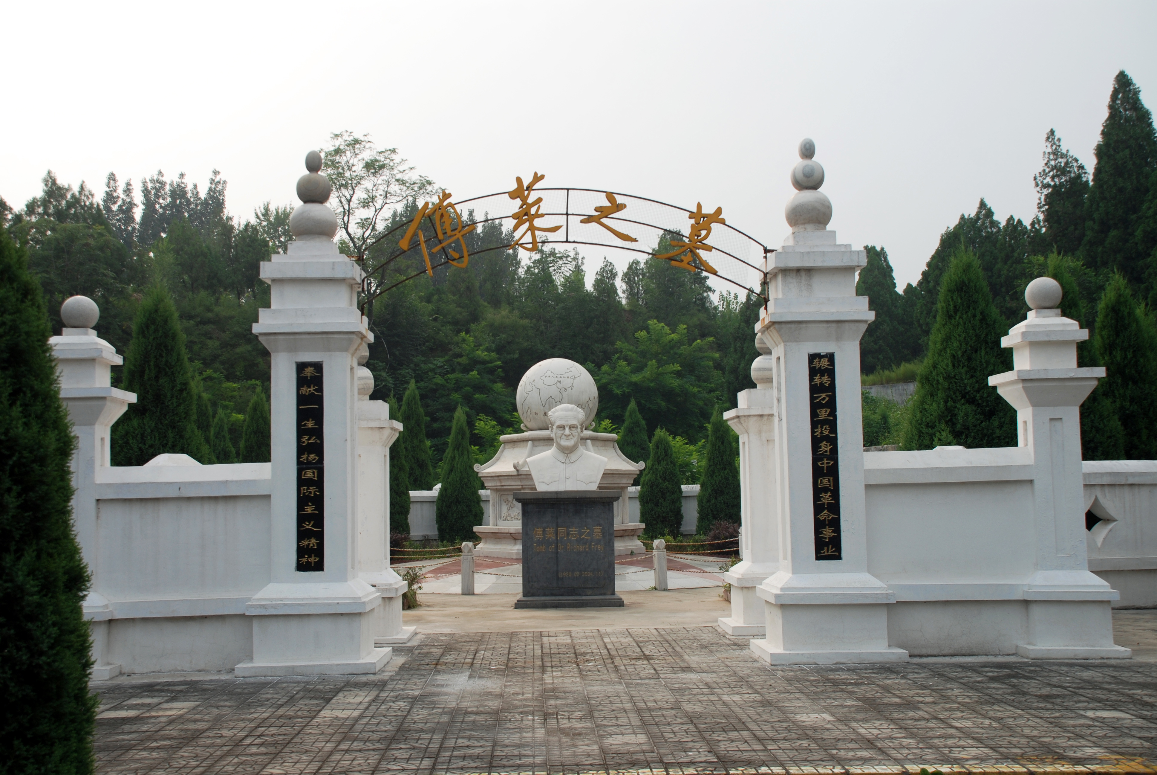 Denkmal und Ruhestätte von Richard Frey im Bezirk Tangxian China